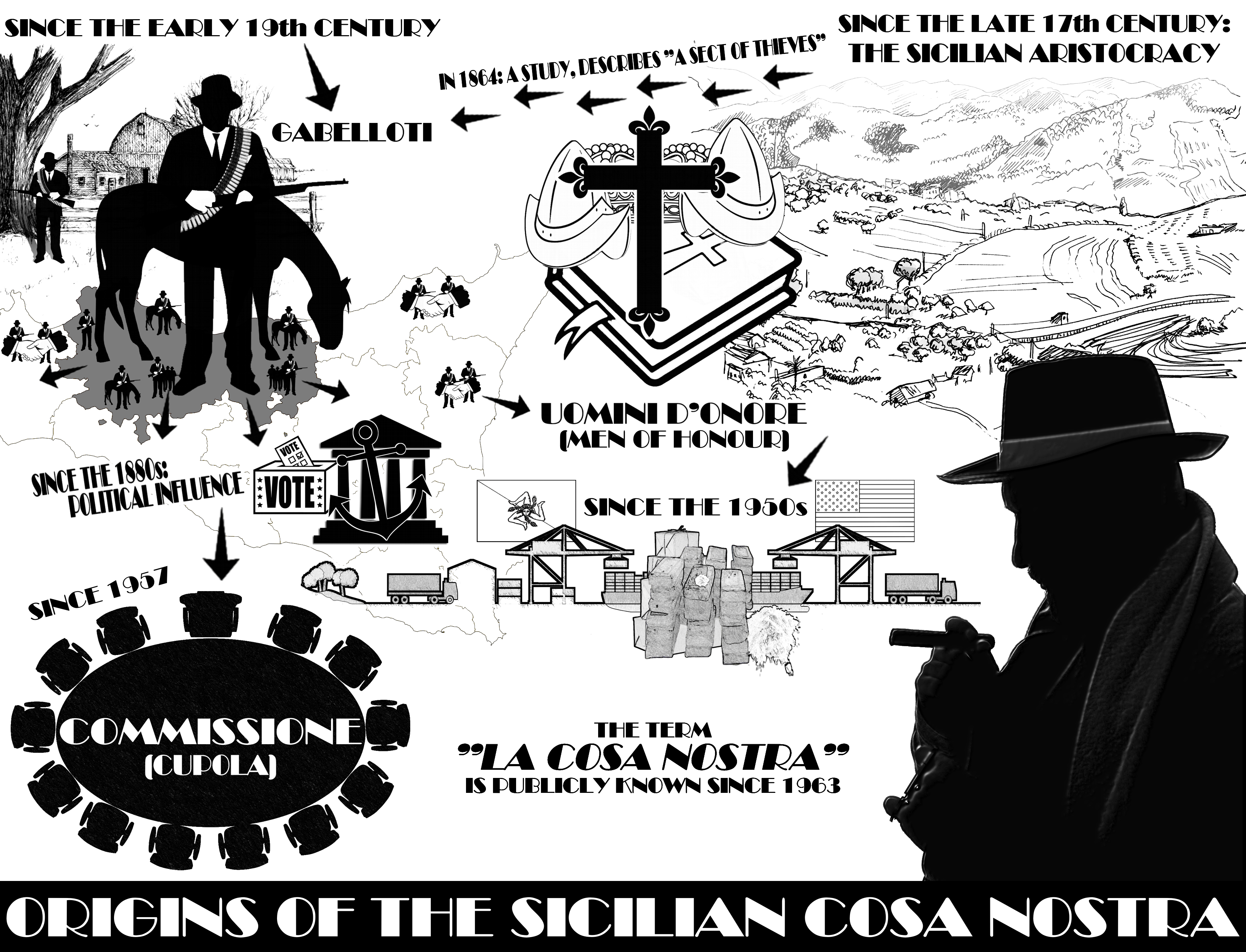 Origins of the Sicilian Cosa Nostra